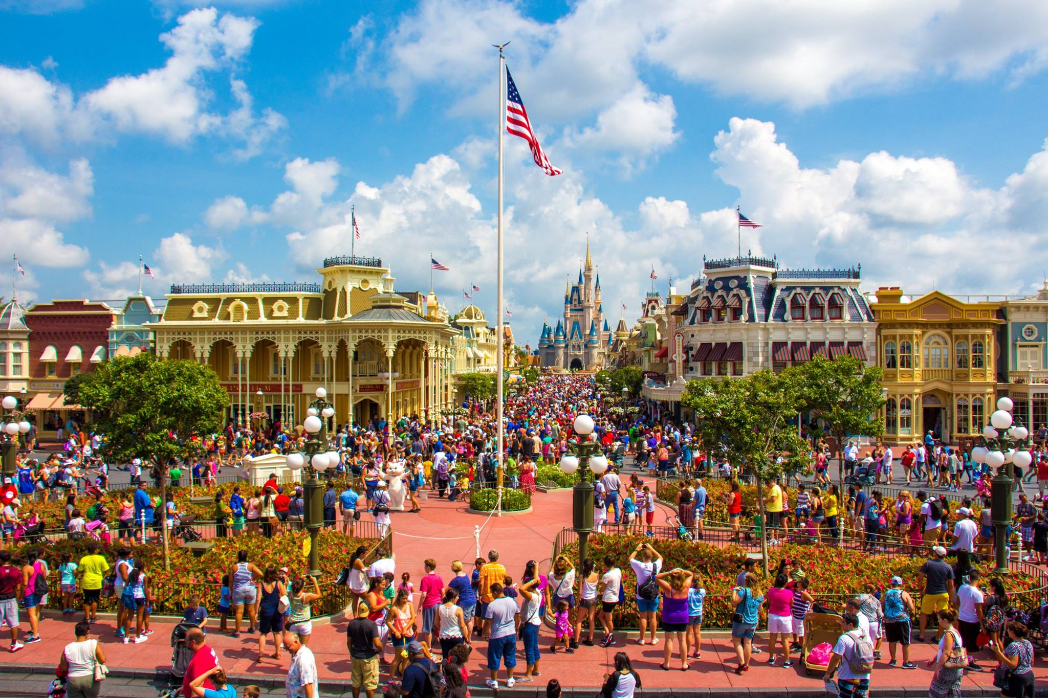 רחוב ראשי ארה"ב - הכניסה לממלכת הקדם בדיסניוורלד אורלנדו פלורידה.